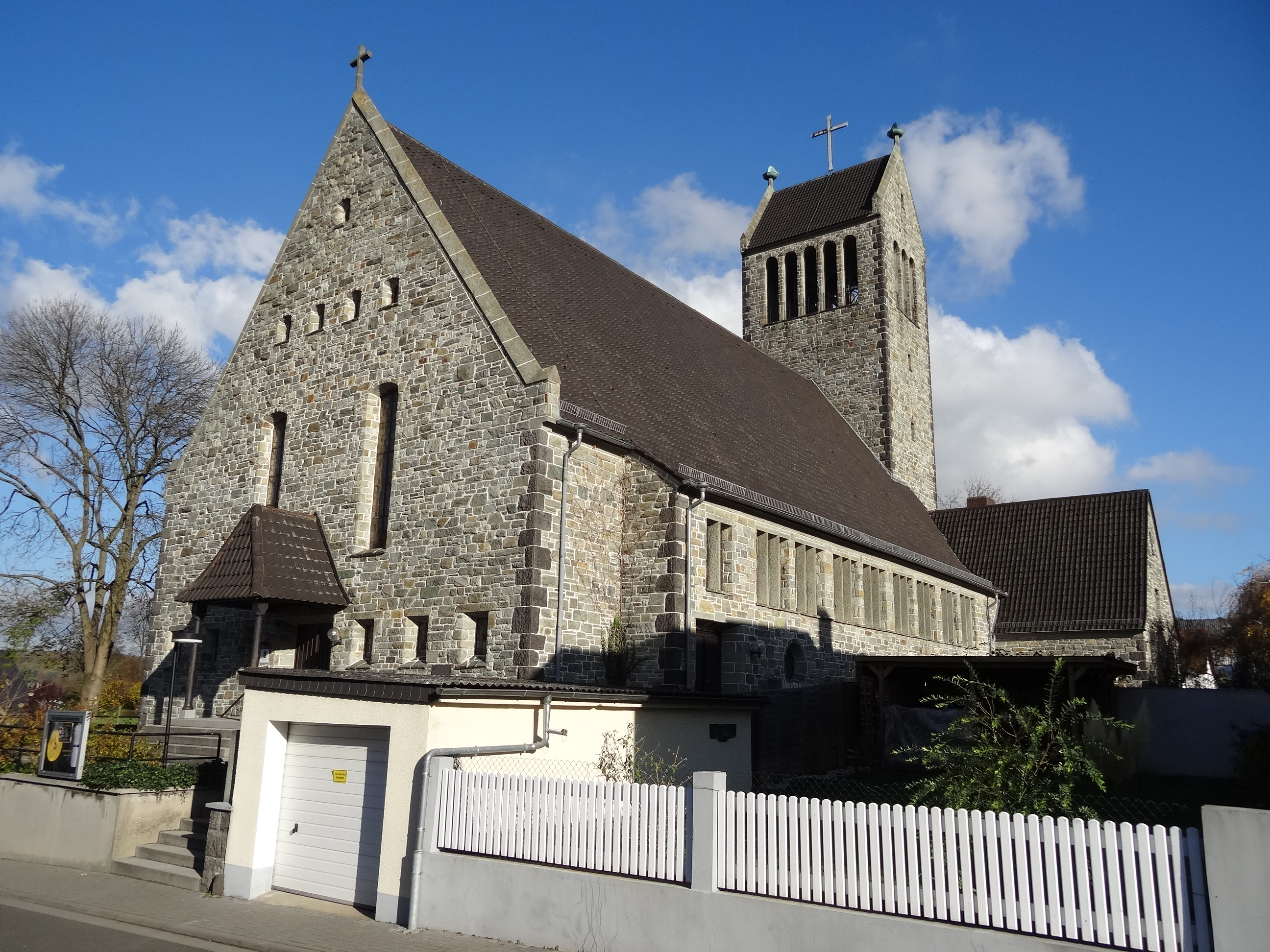 Evangelische Kirche Watzenborn-Steinberg